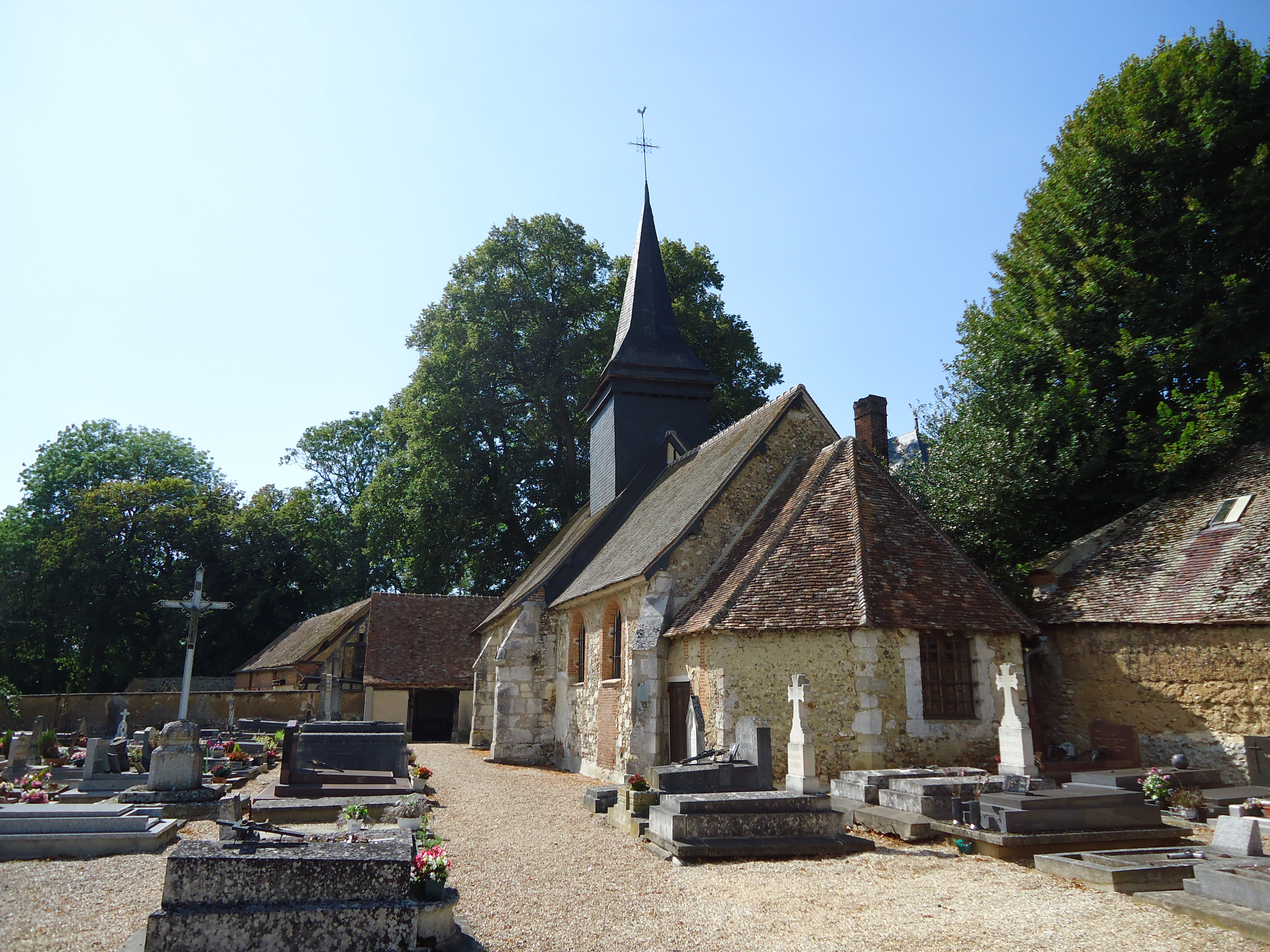 Église Saint-Martin - Miserey - Eure (27)